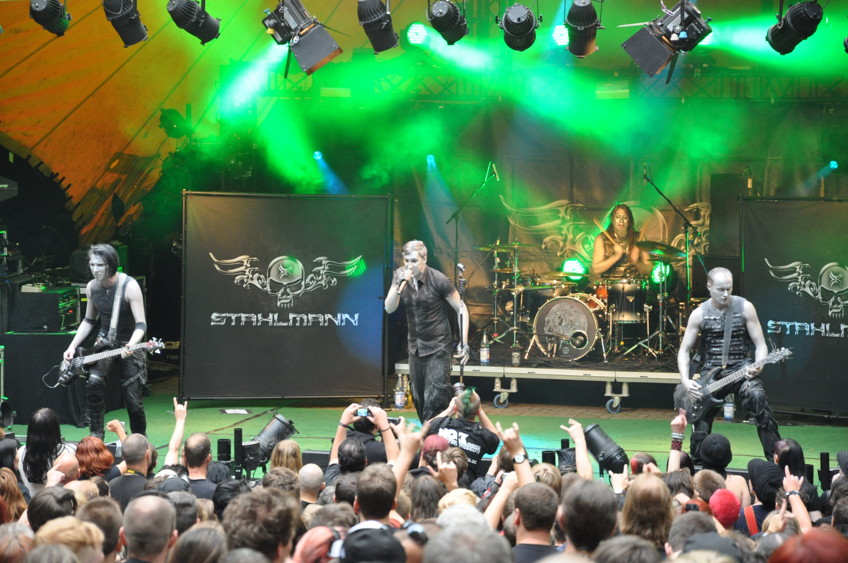 Feuertal 2013 in Wuppertal auf der Waldbühne Hardt: Stahlmann